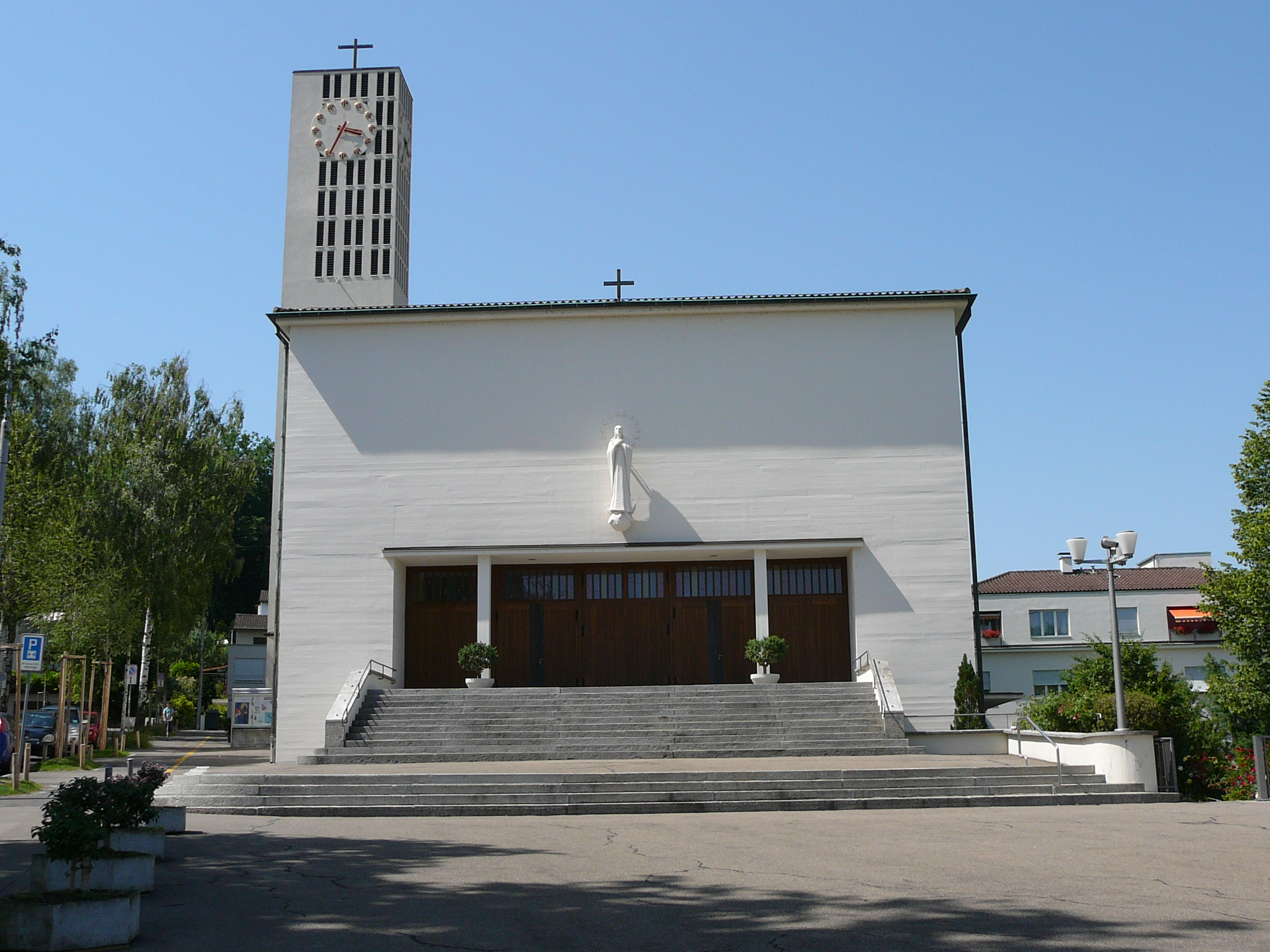 Römisch-katholische Kirche Maria Lourdes von der Schaffhauserstrasse her gesehen